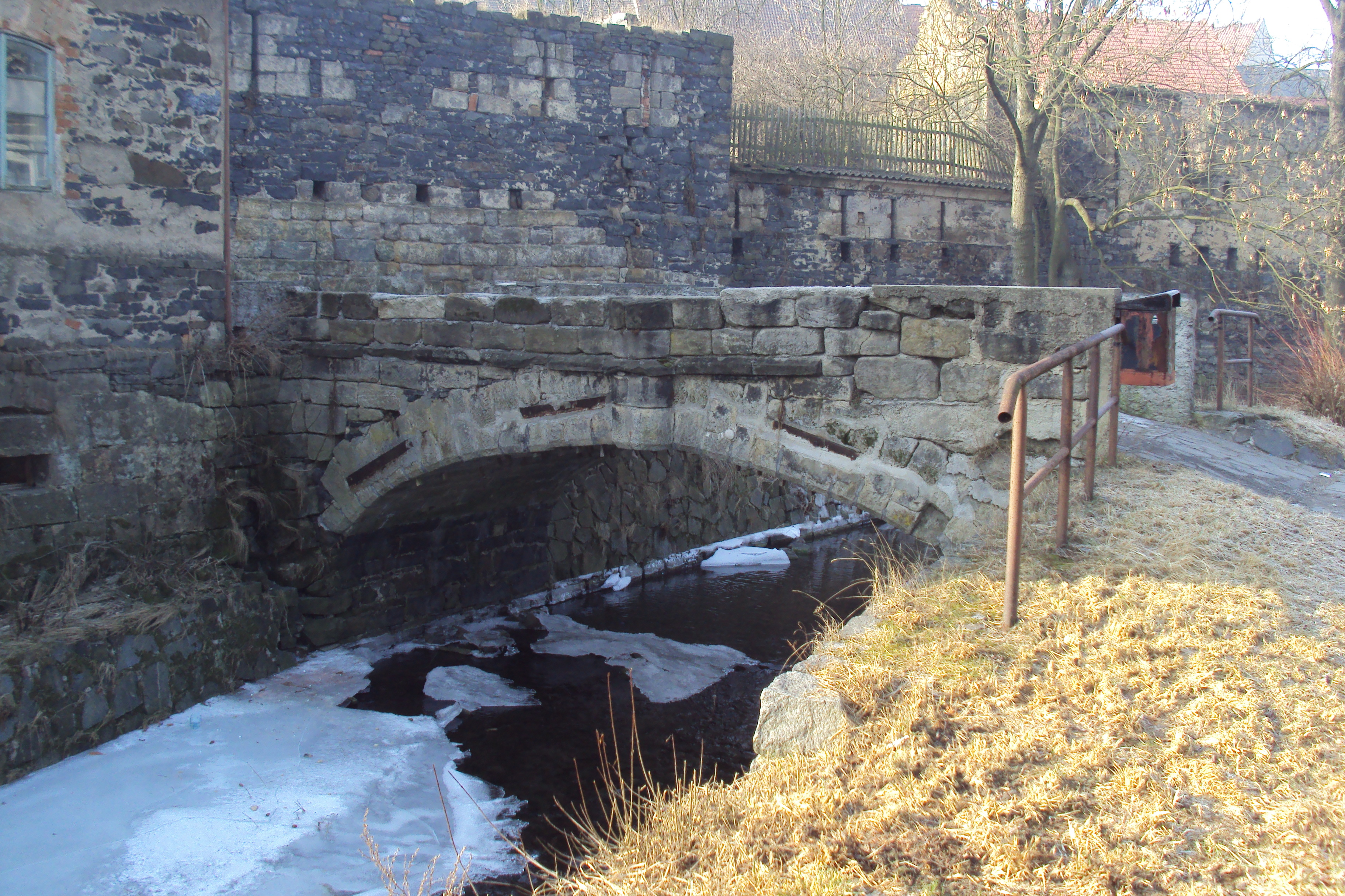 Most pro pěší u Kravařských hradeb přes Panenský potok